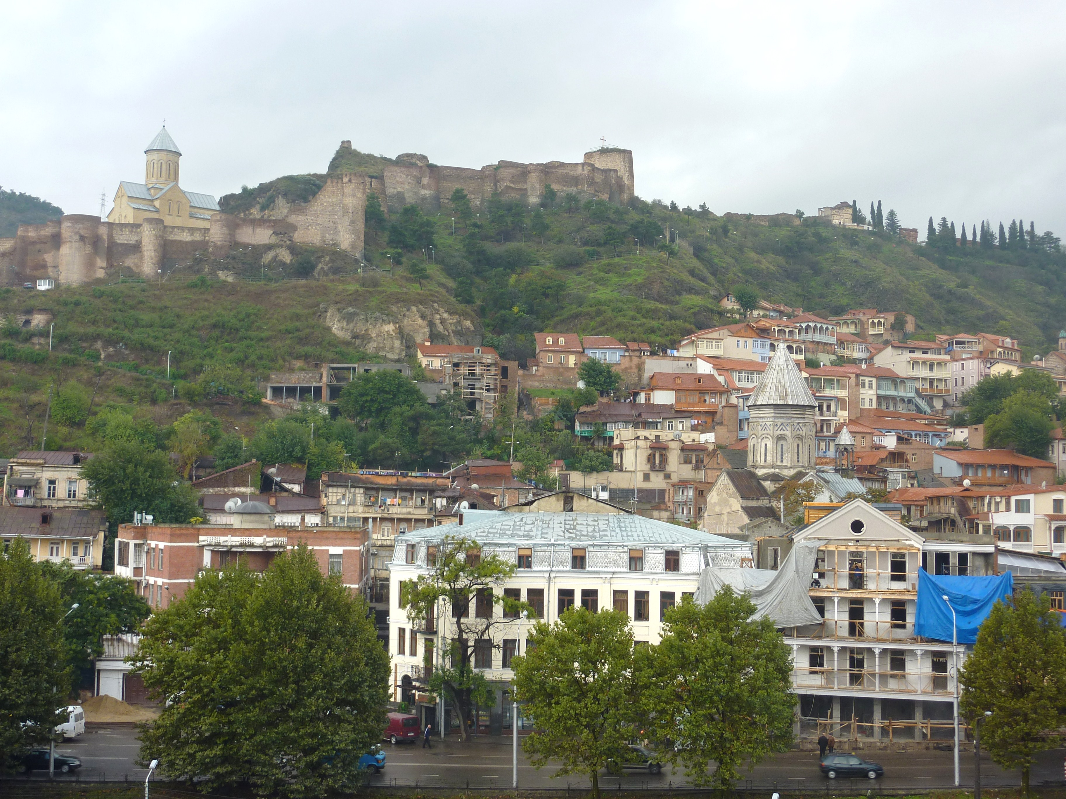 Tbilissi: la vieille ville [Dzéli Kalaki] et la citadelle de Narakala